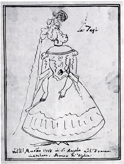 Die Sängerin Vittoria Tesi Karrikatur von Antonio Maria Zanetti